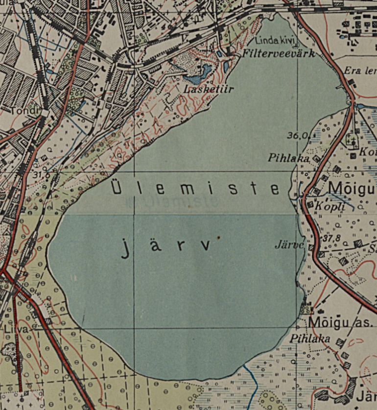 Ülemiste järv 1936. aasta 1:50 000 Eesti kaardi Tallinna kaardilehel